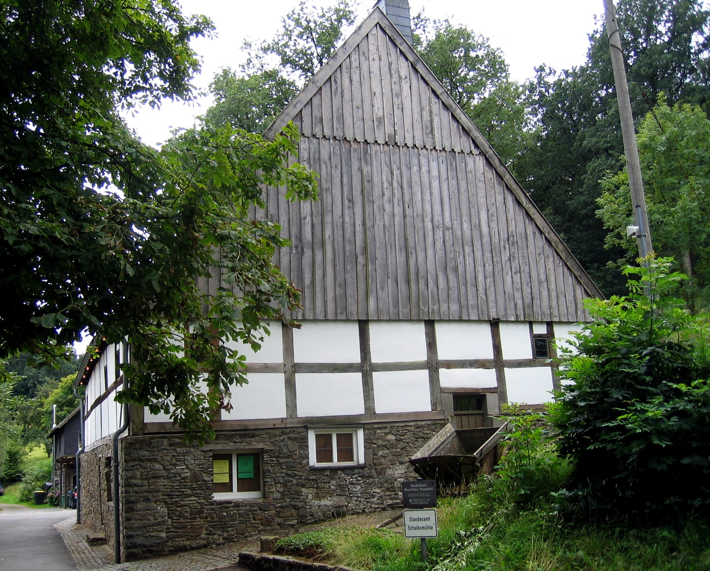 Denkmalgeschütztes Bauernhaus (um 1600) in Schalksmühle-Wippekühl.